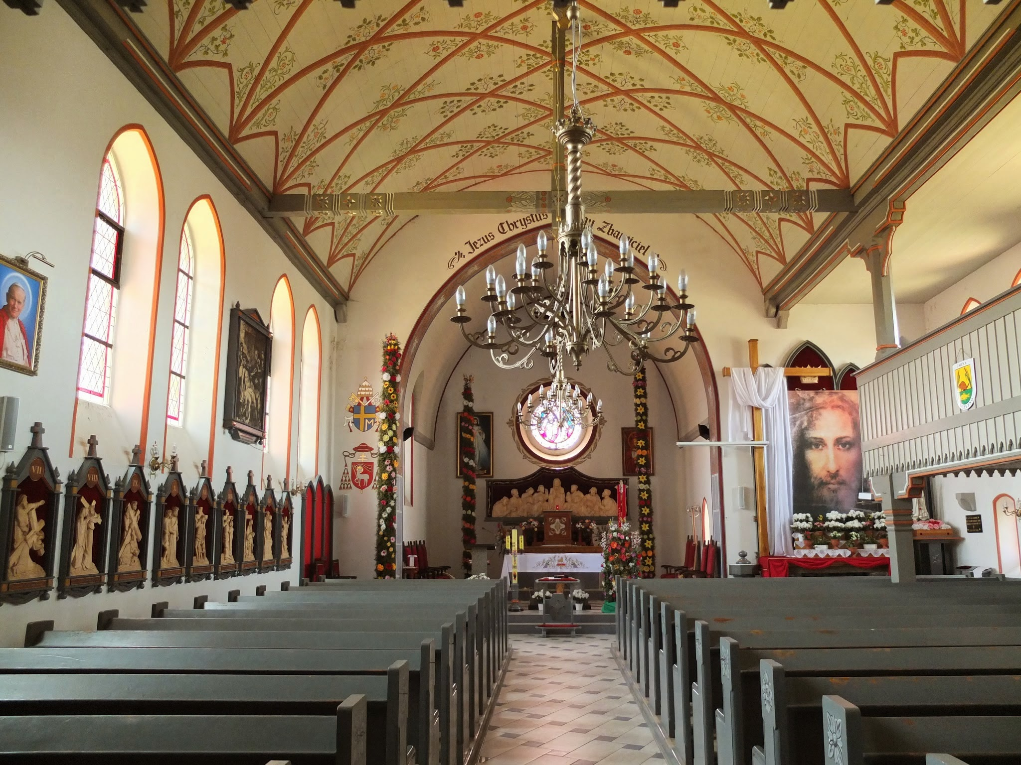 Gawrzyjałki - dawny kościół ewangelicki, od lat 80. XX w rzymskokatolicki filialny p.w. św. Wojciecha, 1907-1908